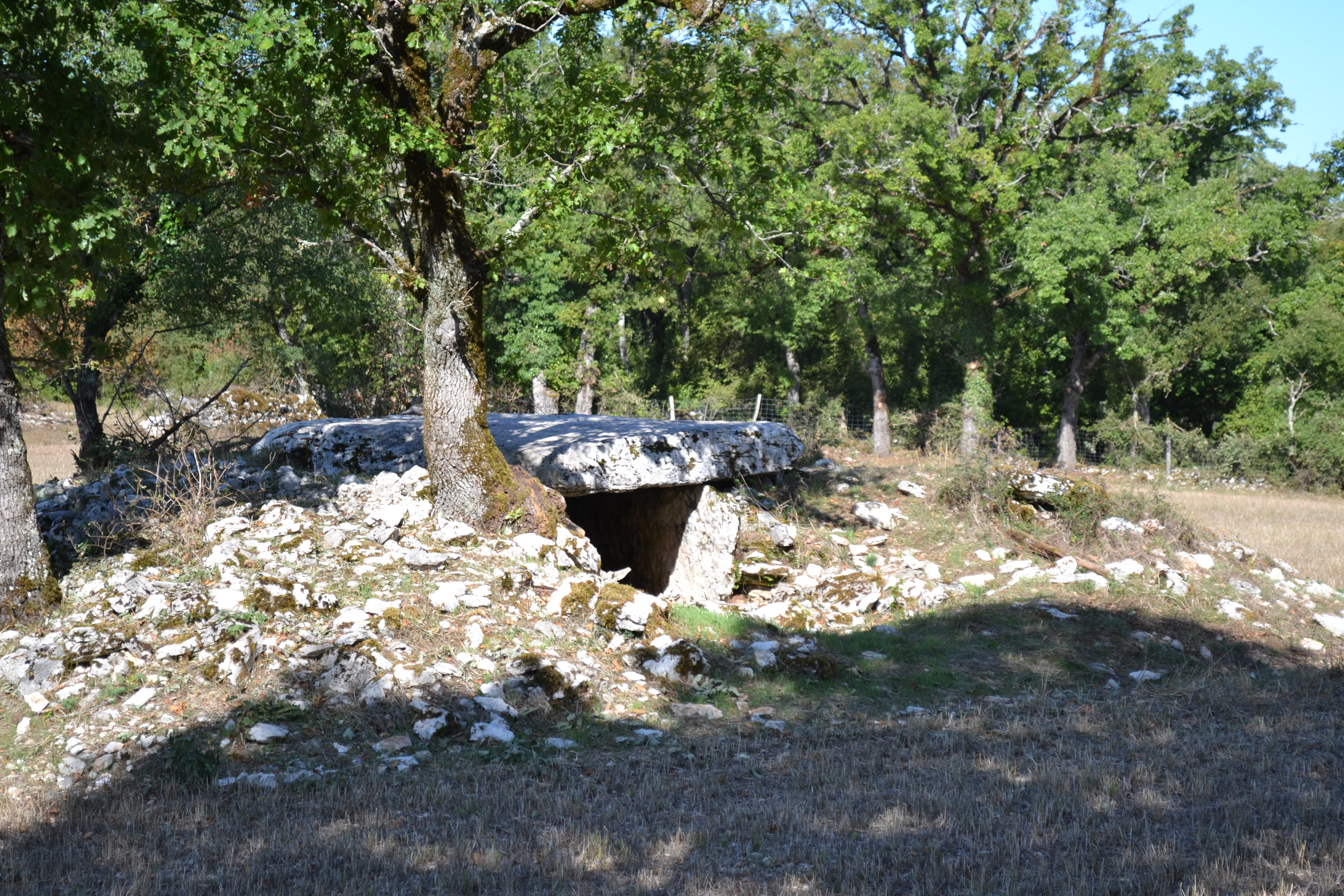 Dolmen du Rat, Saint-Sulpice